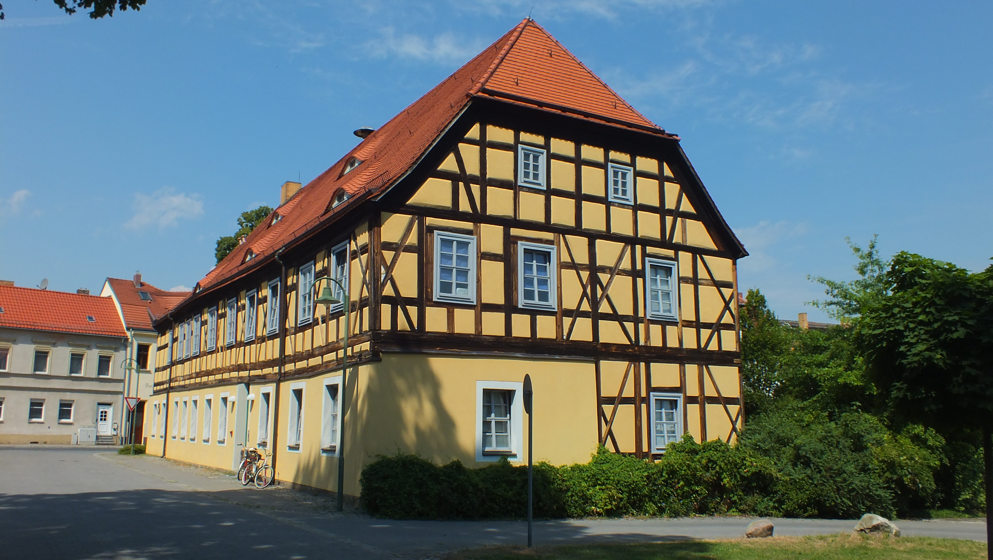 Denkmal Geschützes Gut Reitzenstein in Annaburg